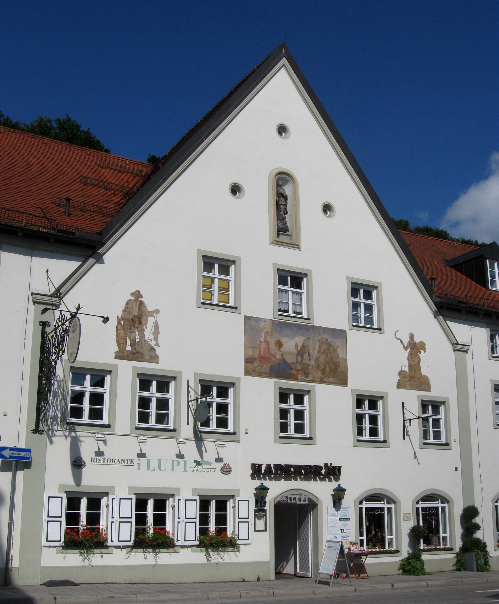 Untermarkt 17; Ehemaliger Brauereigasthof, zweigeschossiger giebelständiger Steildachbau mit Putzgliederung, traufständigen dreigeschossigen Seitenflügeln, Hausfigur und barockem Ausleger, Hauptbau im Kern von 1556, Südflügel 1830, Maria Immaculata Mitte 18. Jahrhundert.